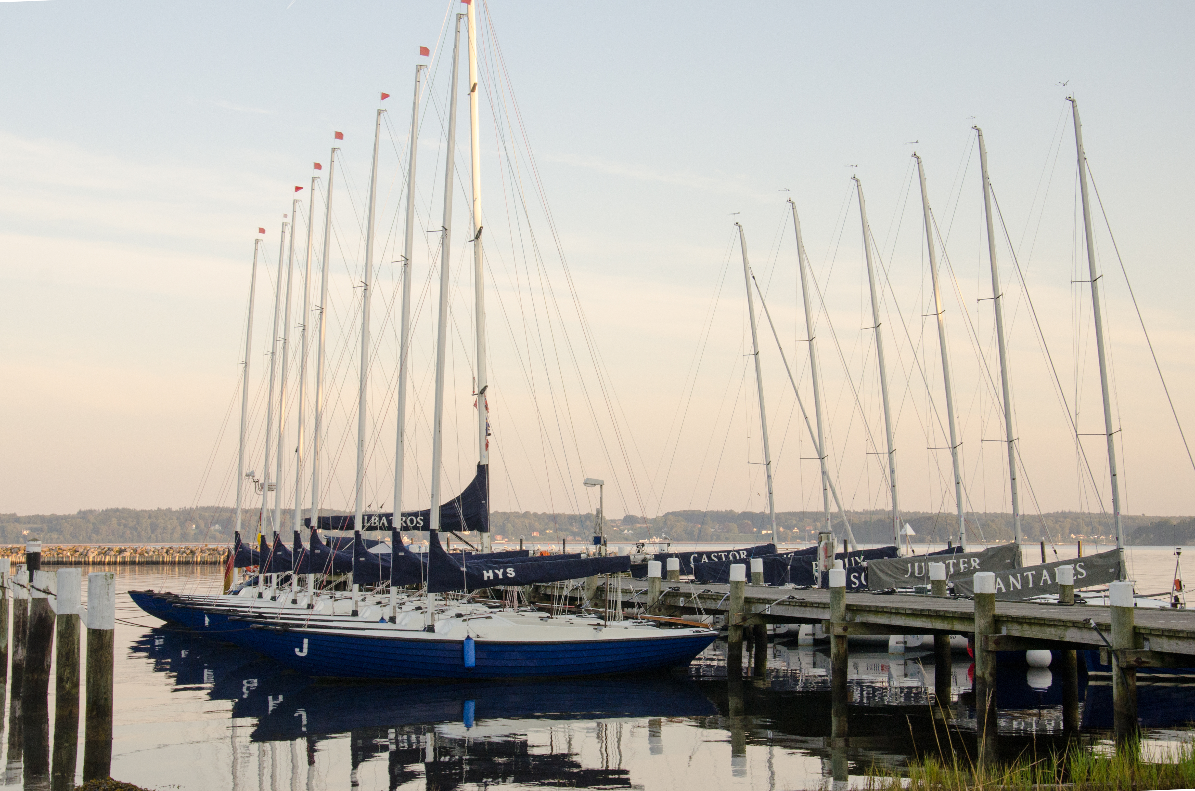 Ausbildungboote der Hanseatischen Yachtschule an der "Ostseebrücke". Links vom Steg sind Folkeboote, rechts davon J/80.